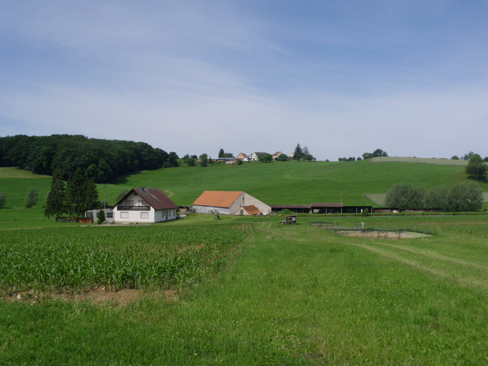 Die Balsenmühle und der Kreuthof, Ortsteile von Heidenheim im mittelfränkischen Landkreis Weißenburg-Gunzenhausen